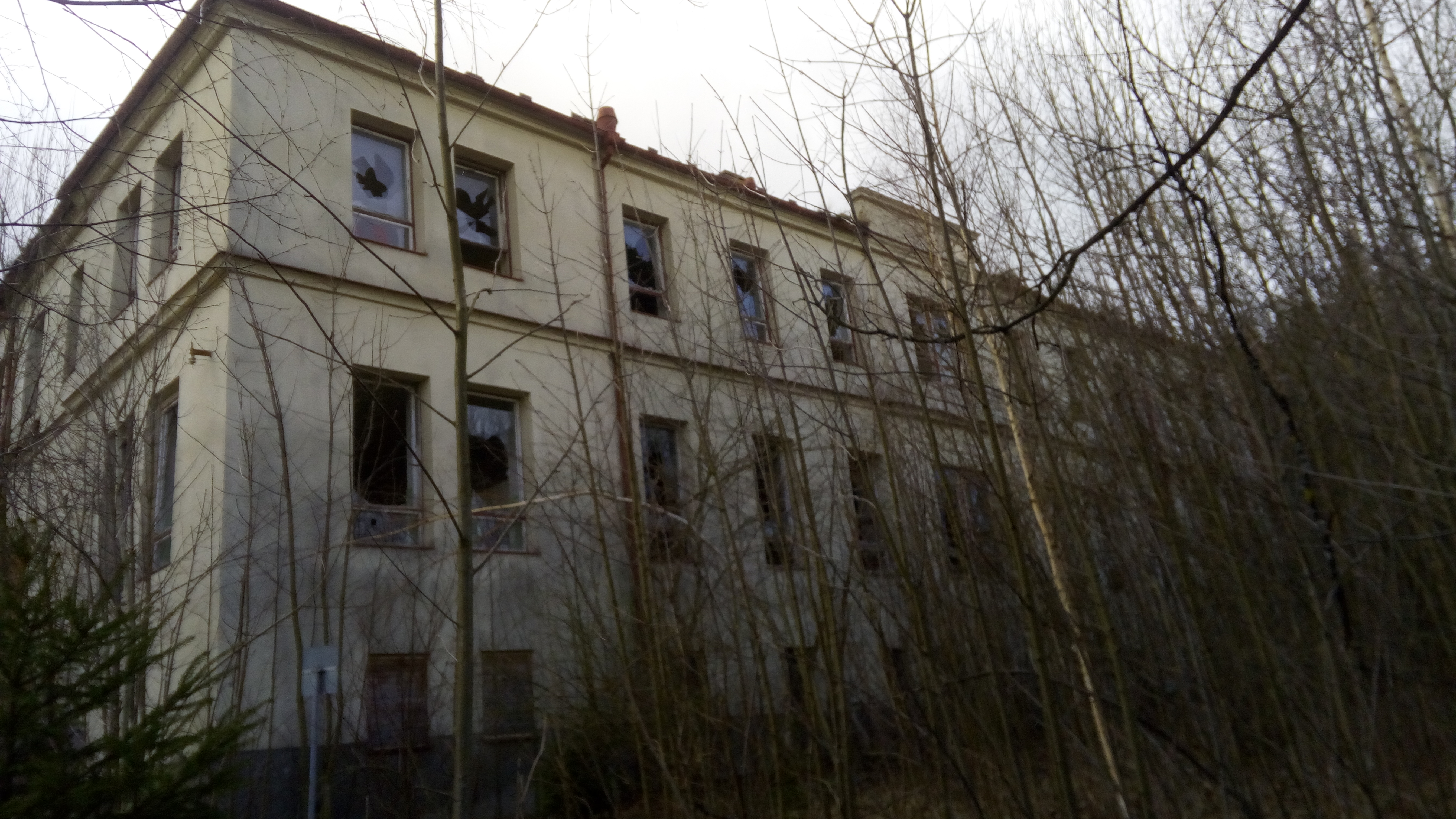 Lázně svaté Markéty,Prachatice